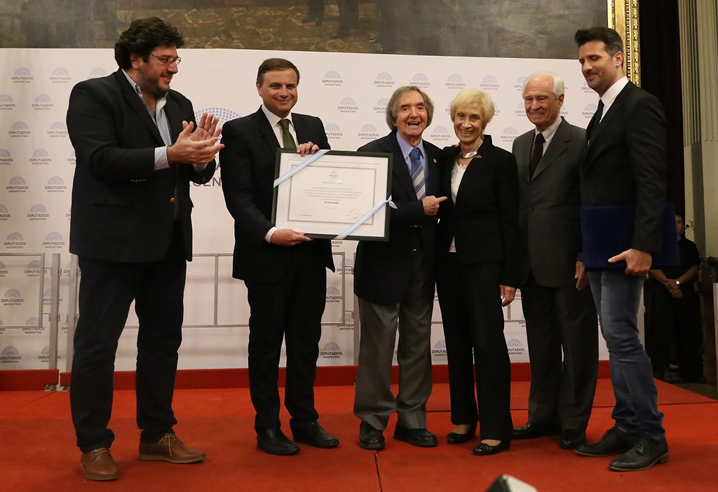 La Cámara de Diputados de la Nación homenajeó al consagrado actor Carlitos Balá en un acto realizado en el Salón de los Pasos Perdidos. Con la presencia del ministro de Cultura de la Nación, Pablo Avelluto, y el diputado nacional Juan Fernando Brügge, se le entregó a Carlitos Balá una Mención de Honor en reconocimiento a su trayectoria artística. El actor José María Listorti, que ofició de conductor del homenaje.